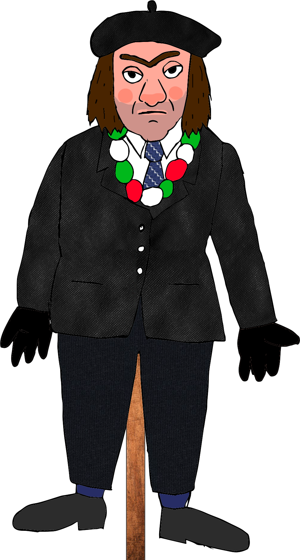 Markitos